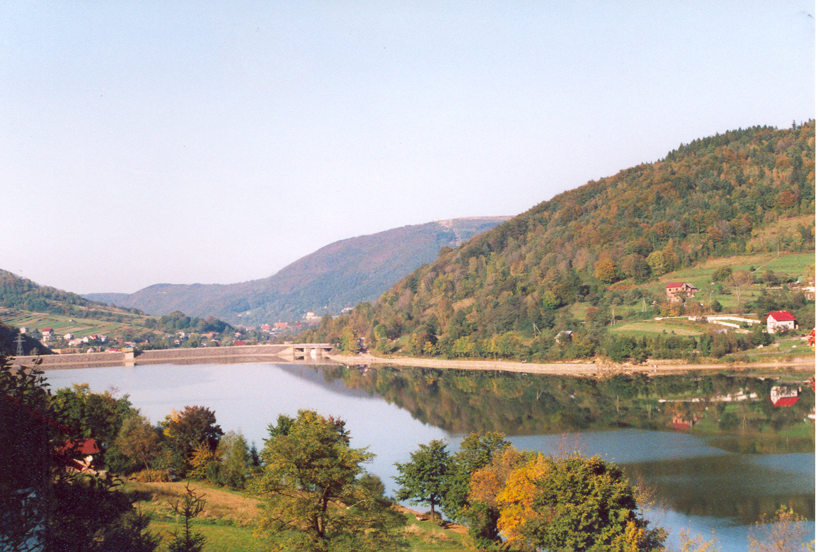 Jezioro Żywieckie - Zapora w Tresnej